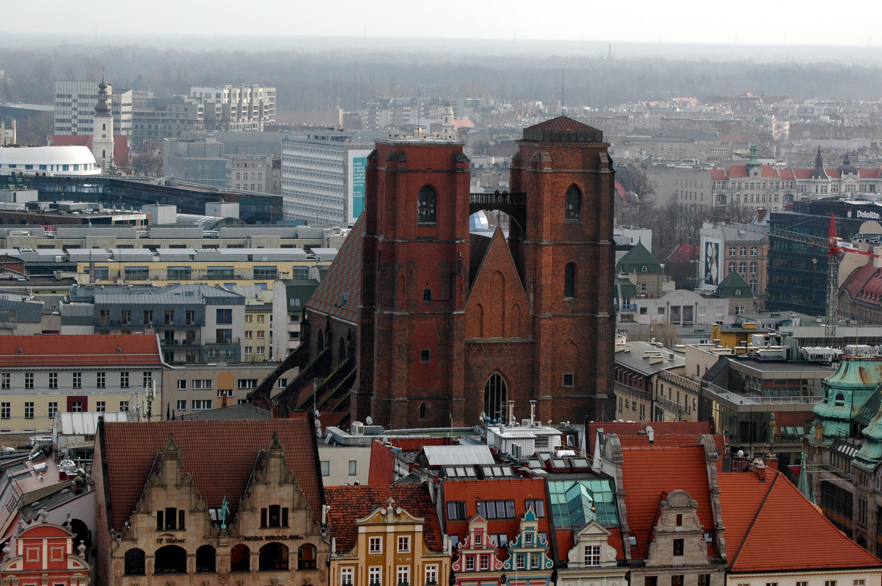 Katedra św. Marii Magdaleny we Wrocławiu w 2015 roku